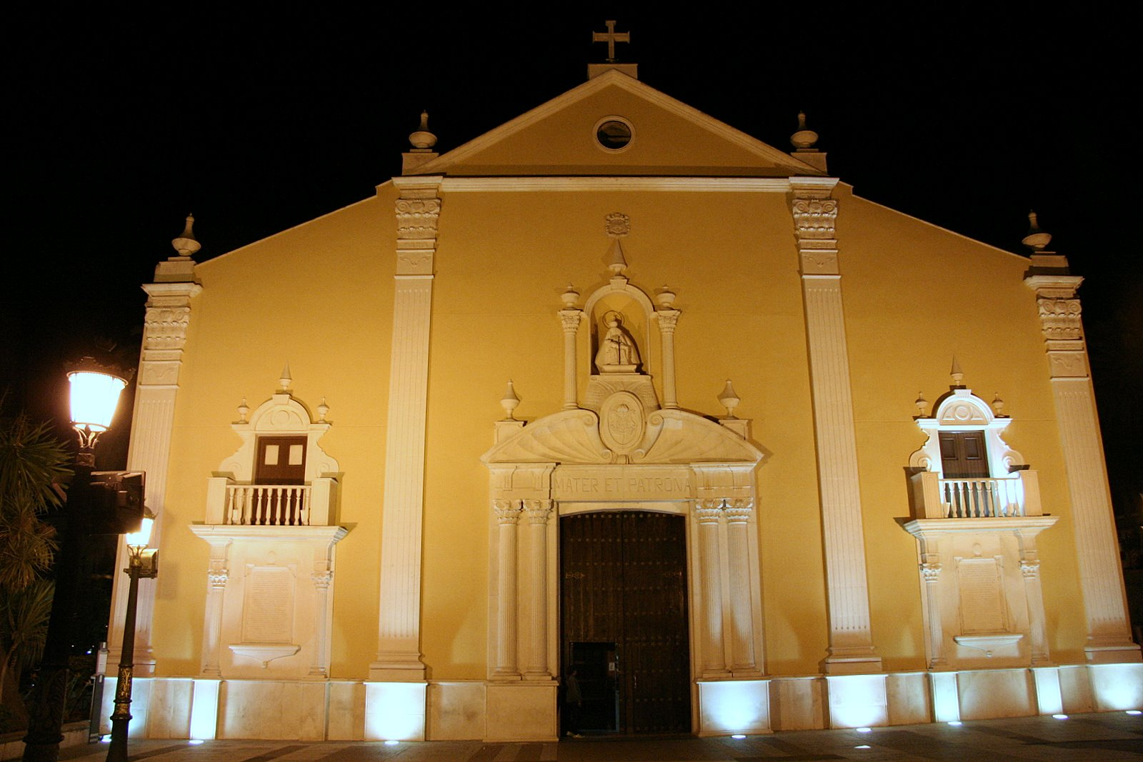 Vista nocturna de la iglesia de Nuestra Señora de África, Ceuta